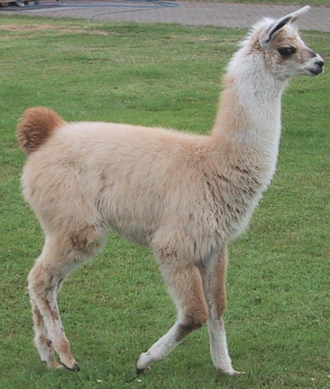 Young Lama